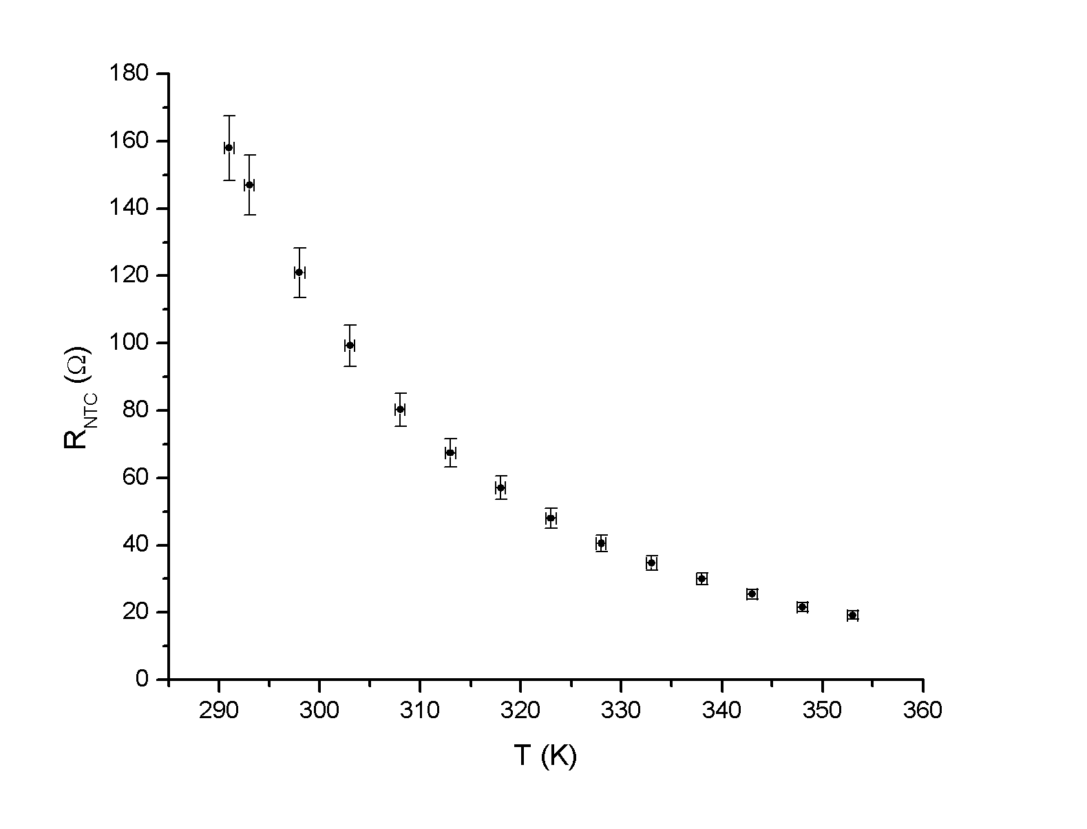 Experimental resistence-temperature curve of a NTC (Negative Temperature Coeficient)